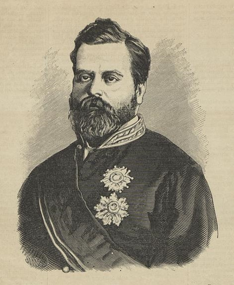 Conselheiro Pedro Luís Pereira de Sousa, Presidente da Província da Bahia (Segundo uma fotografia de G. Geensly).